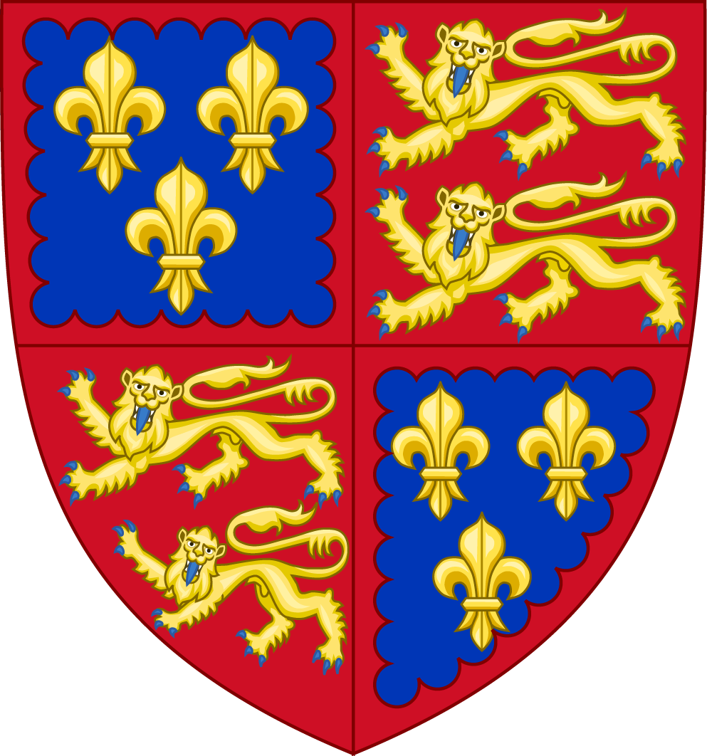 Blason de Charles de France, duc de Berry et d'Aquitaine.